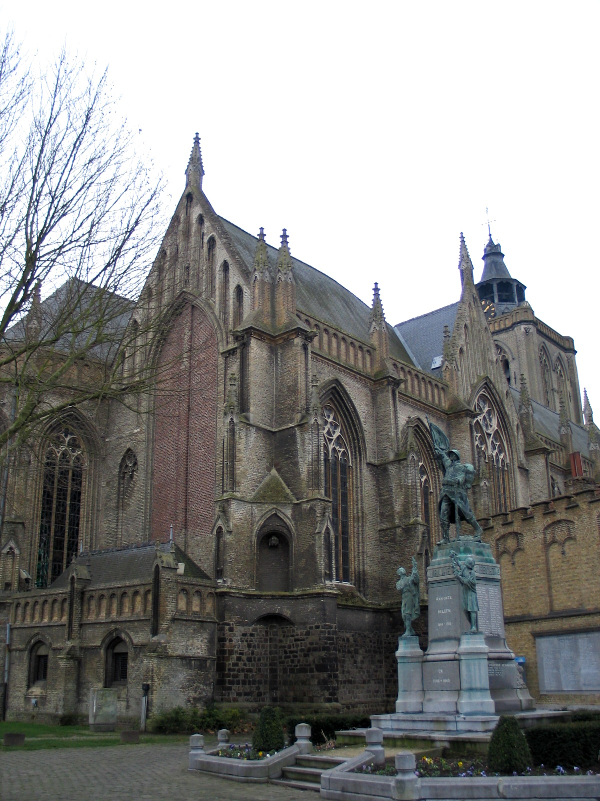 Sint-Bertinuskerk te Poperinge (17 jan 2005) - eigen foto